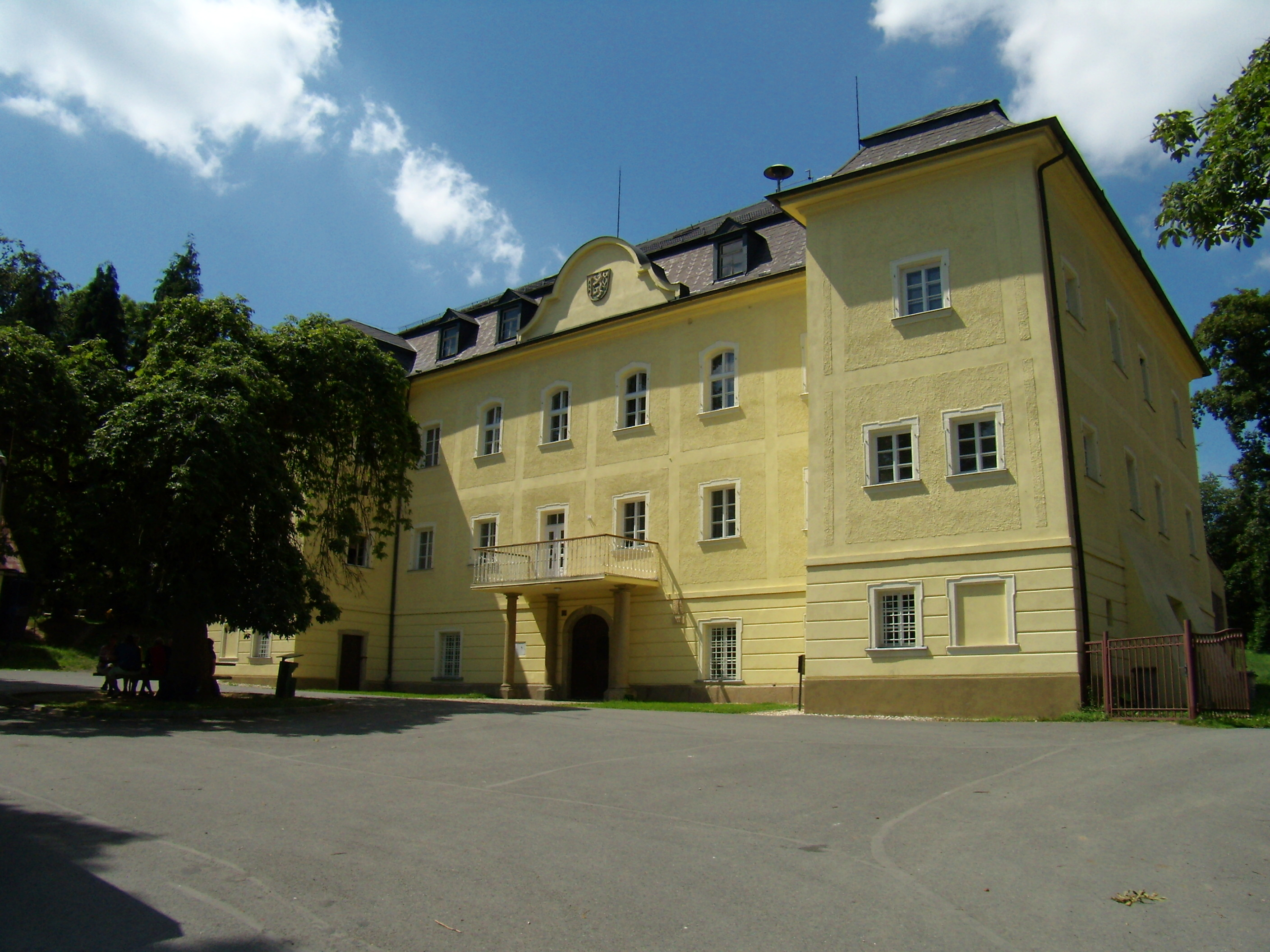 Lesná - zámek